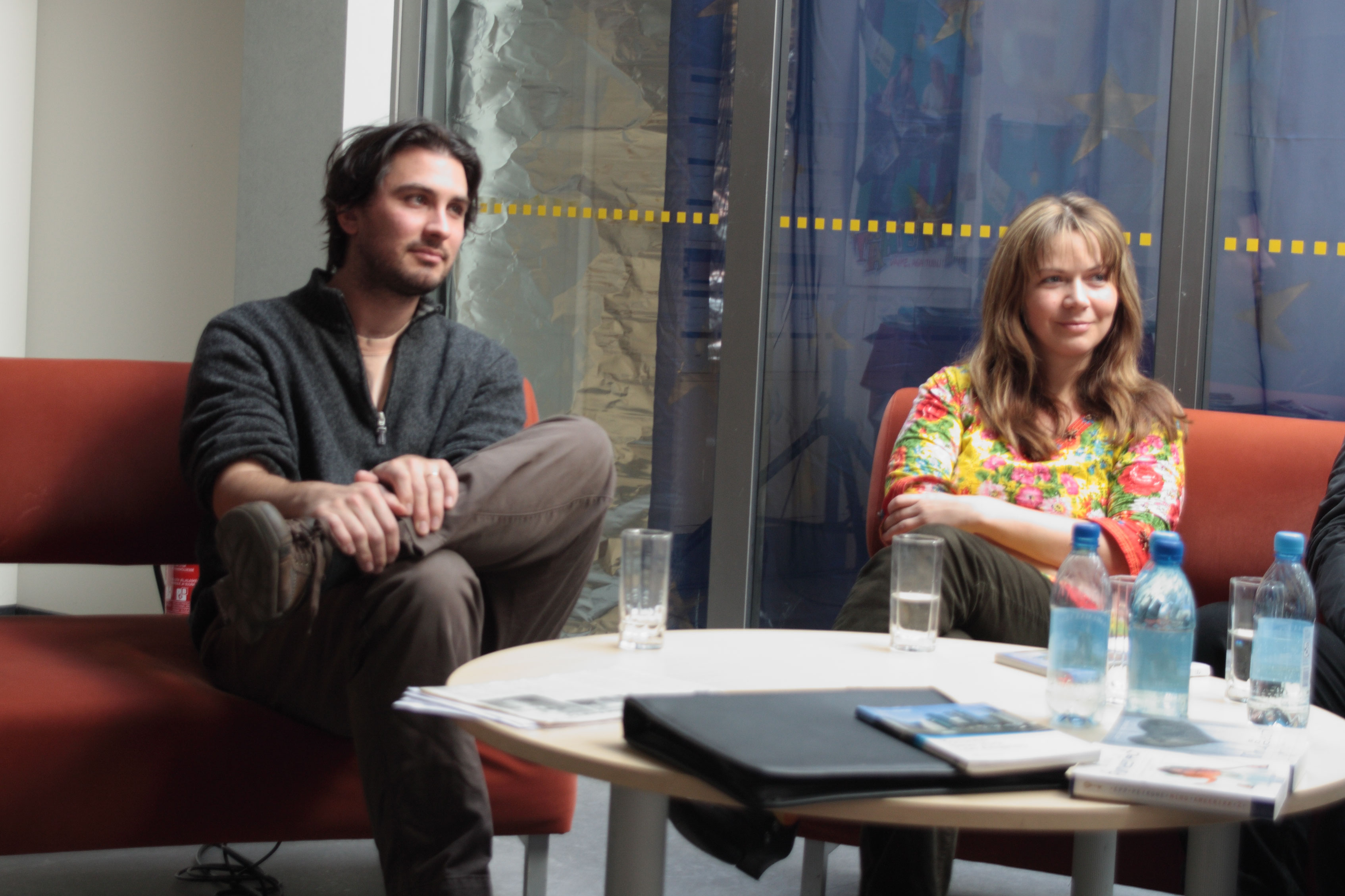 Justin ja Epp Petrone Kuressaare Ameerika teabepunkti 5. sünnipäeva tähistamisel